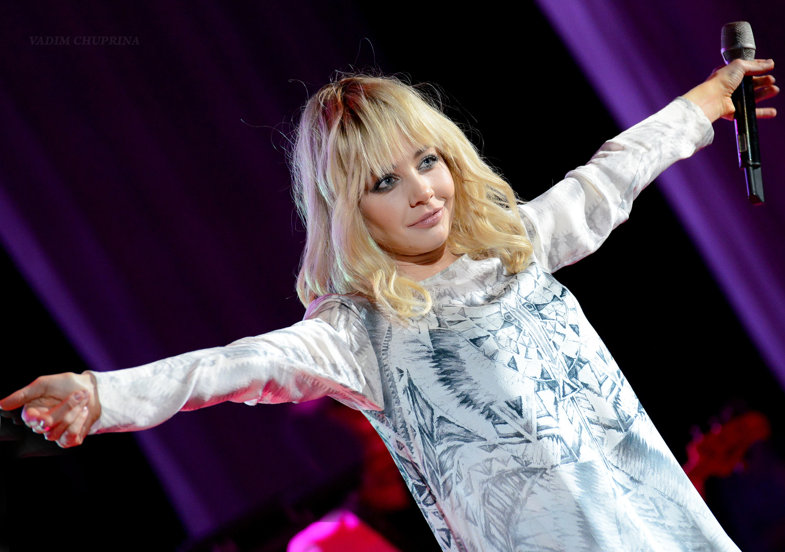 Тина Кароль фото , Чуприна Вадим